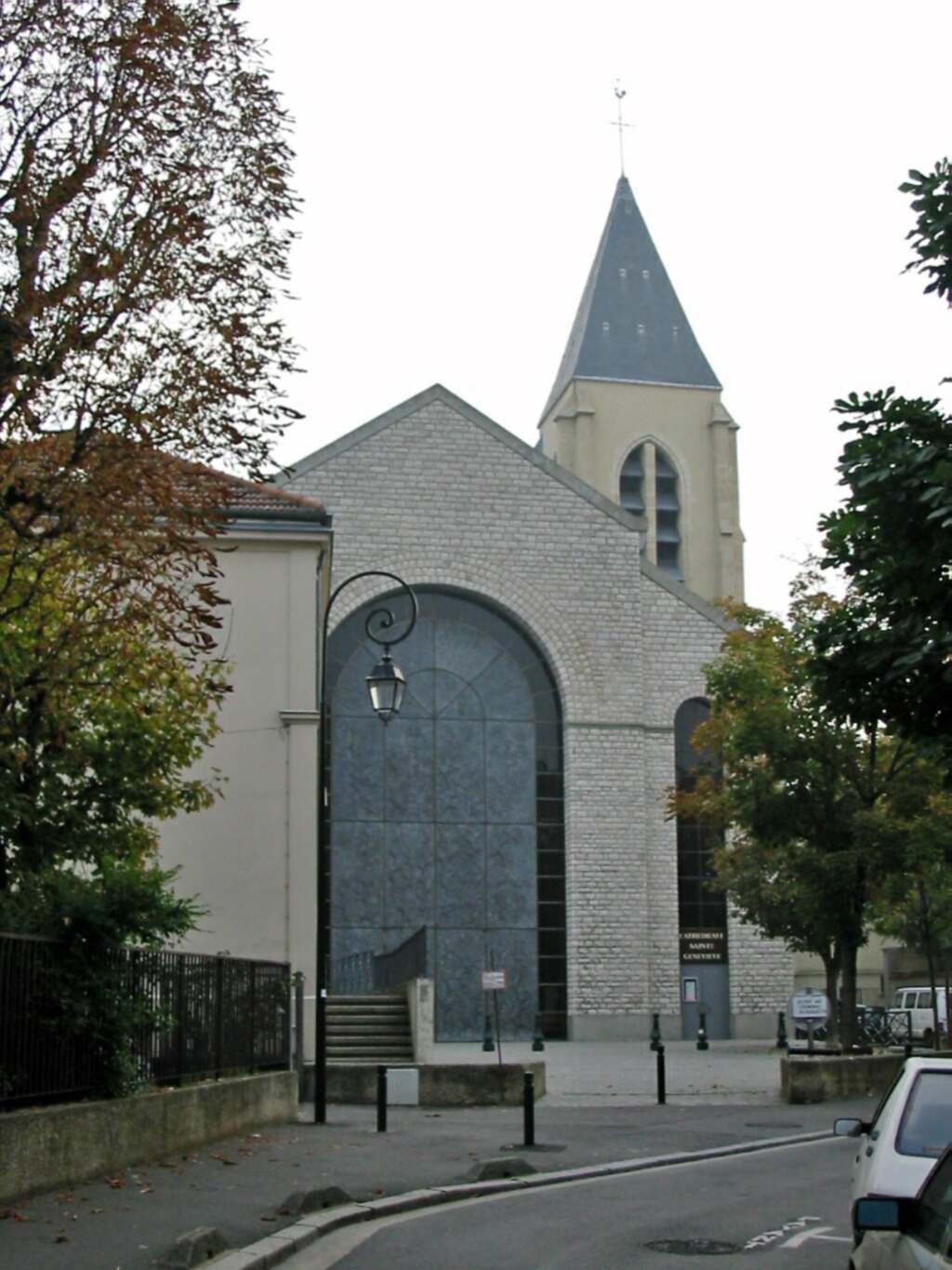 Cathédrale Sainte-Geneviève de Nanterre Photo JH Mora, octobre 2005